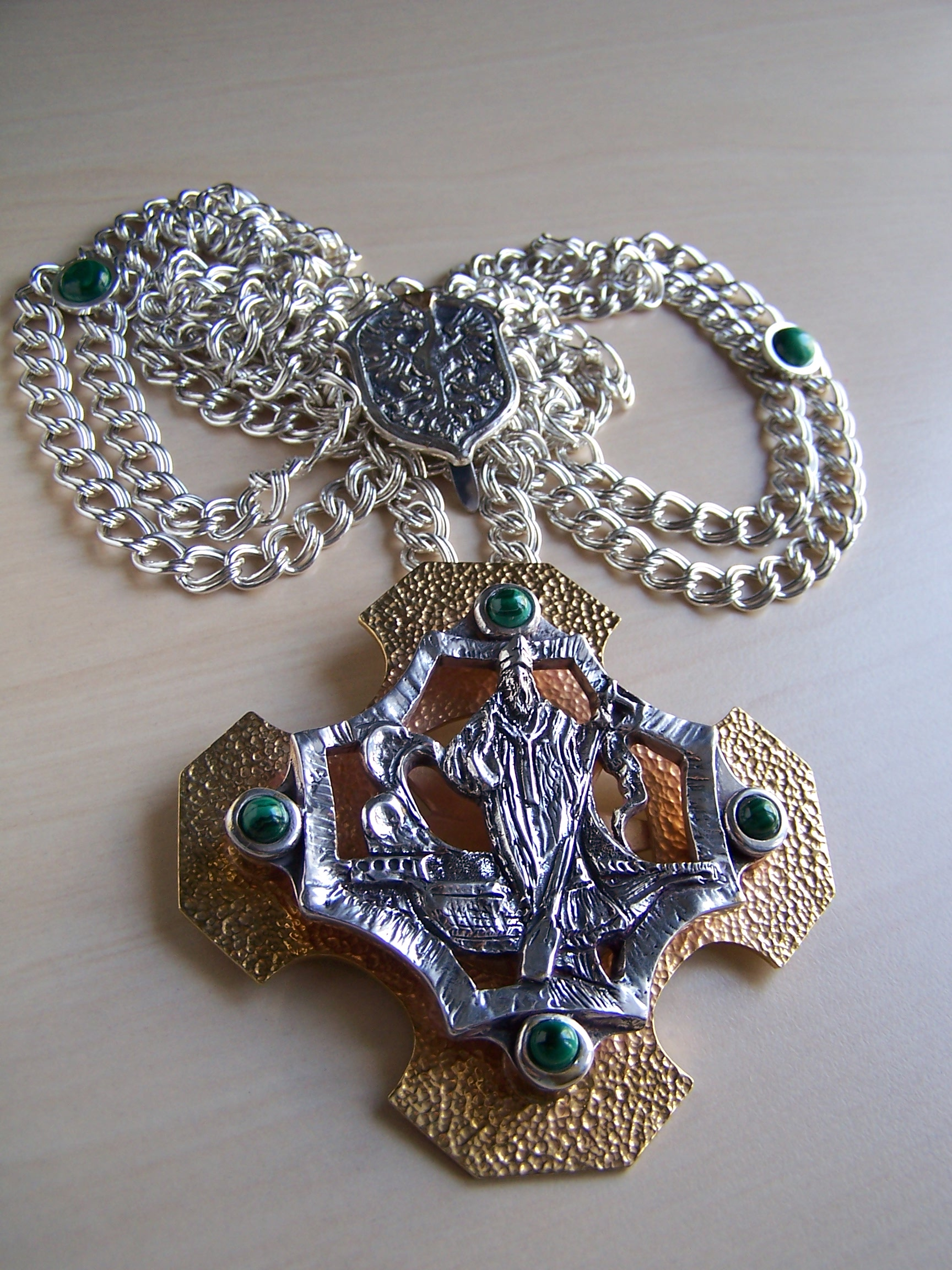 Dystynktorium